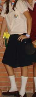 Uniforme de eduación diversificada en Venezuela.